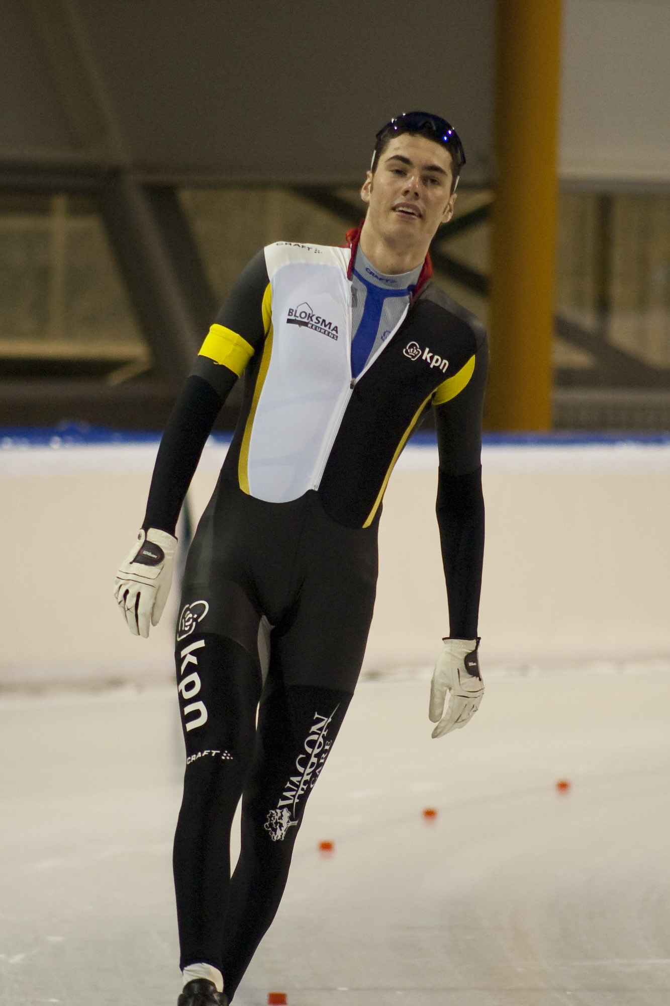 Frank Hermans